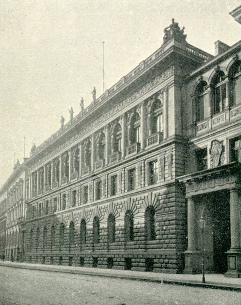 Berlin, Reichsjustizamt, Voßstraße 4-5